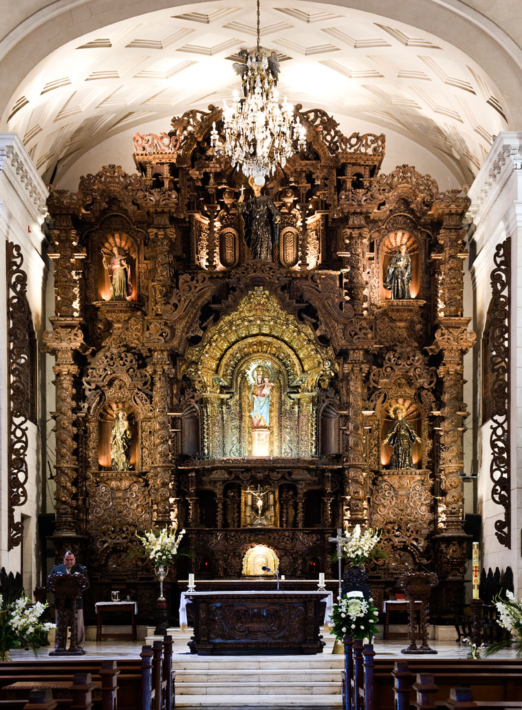 Retablo del altar de la iglesia de San José en el valle del Ingenio, Actualmente se encuentra en la iglesia de la virgen del Pilar en San Isidro, Lima, Perú.